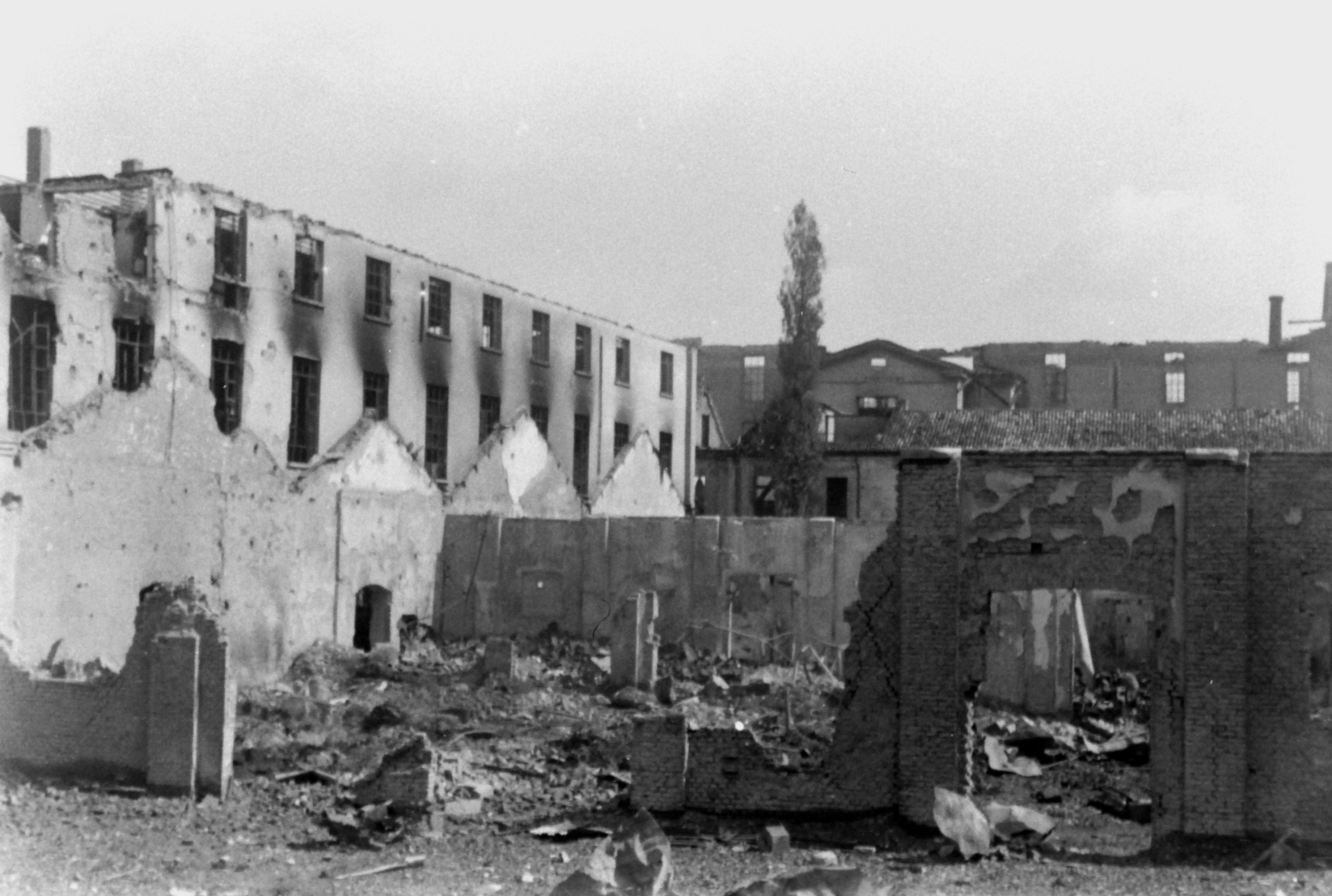 Immagine di MILANO nel 1943. Foto di Alberto Albertini